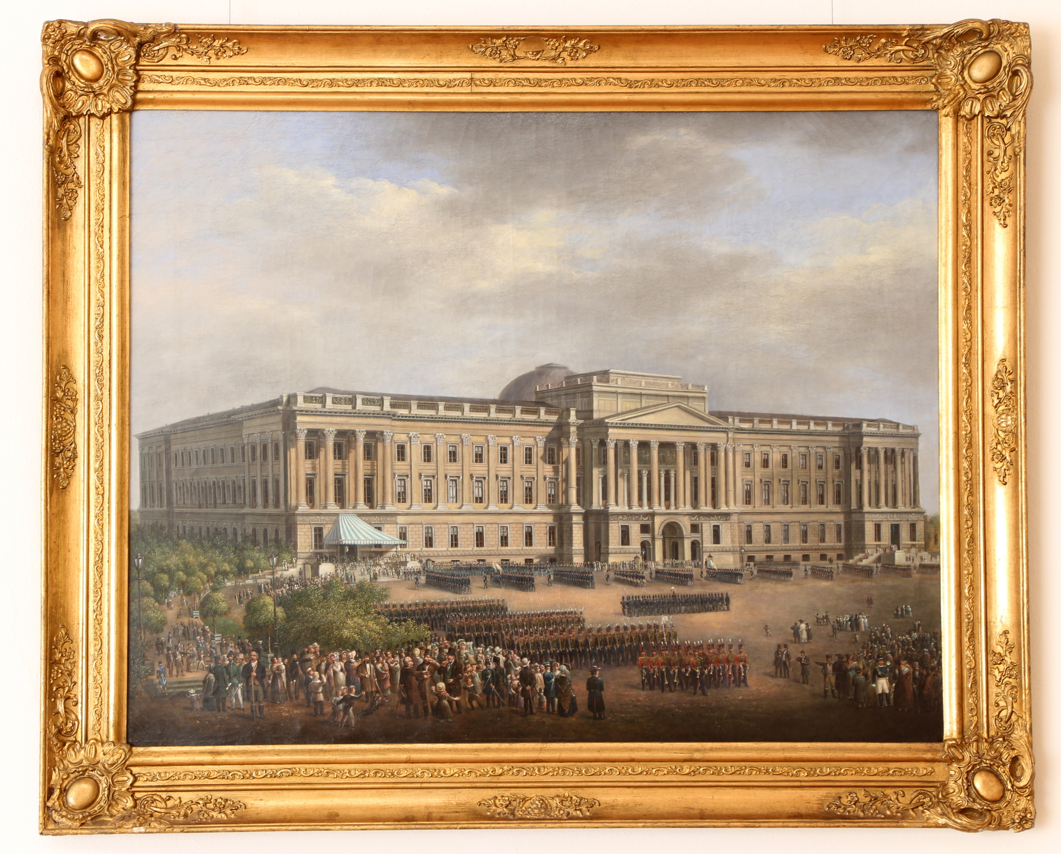 Braunschweigisches Landesmuseum. Wikimedia Deutschland. Juni 2014.